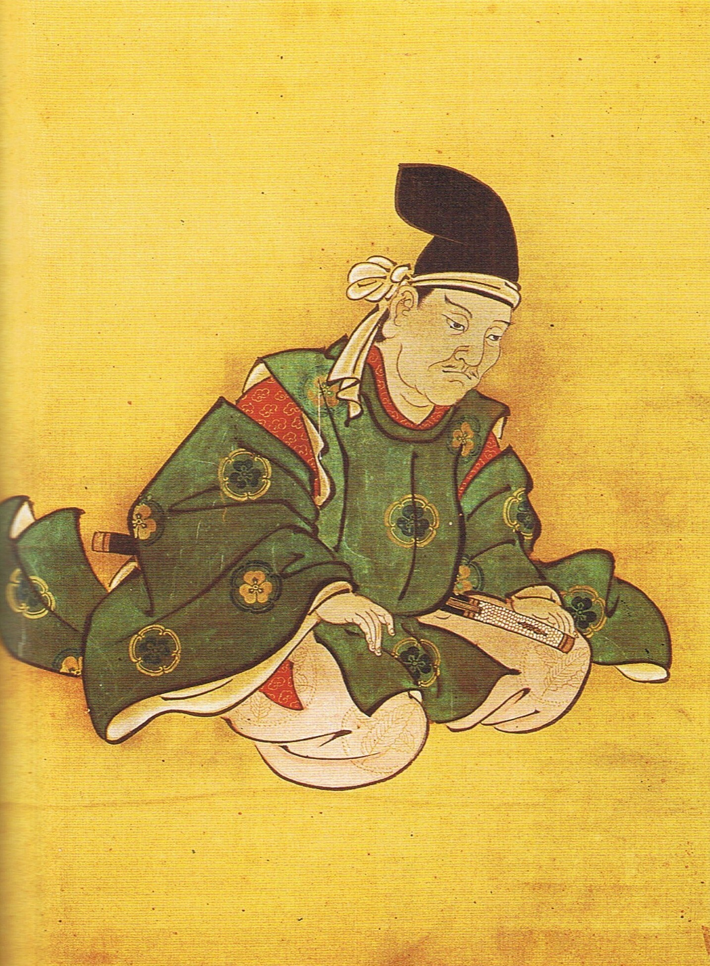 今井兼平像。長野県木曾郡木曽町 徳音寺所蔵